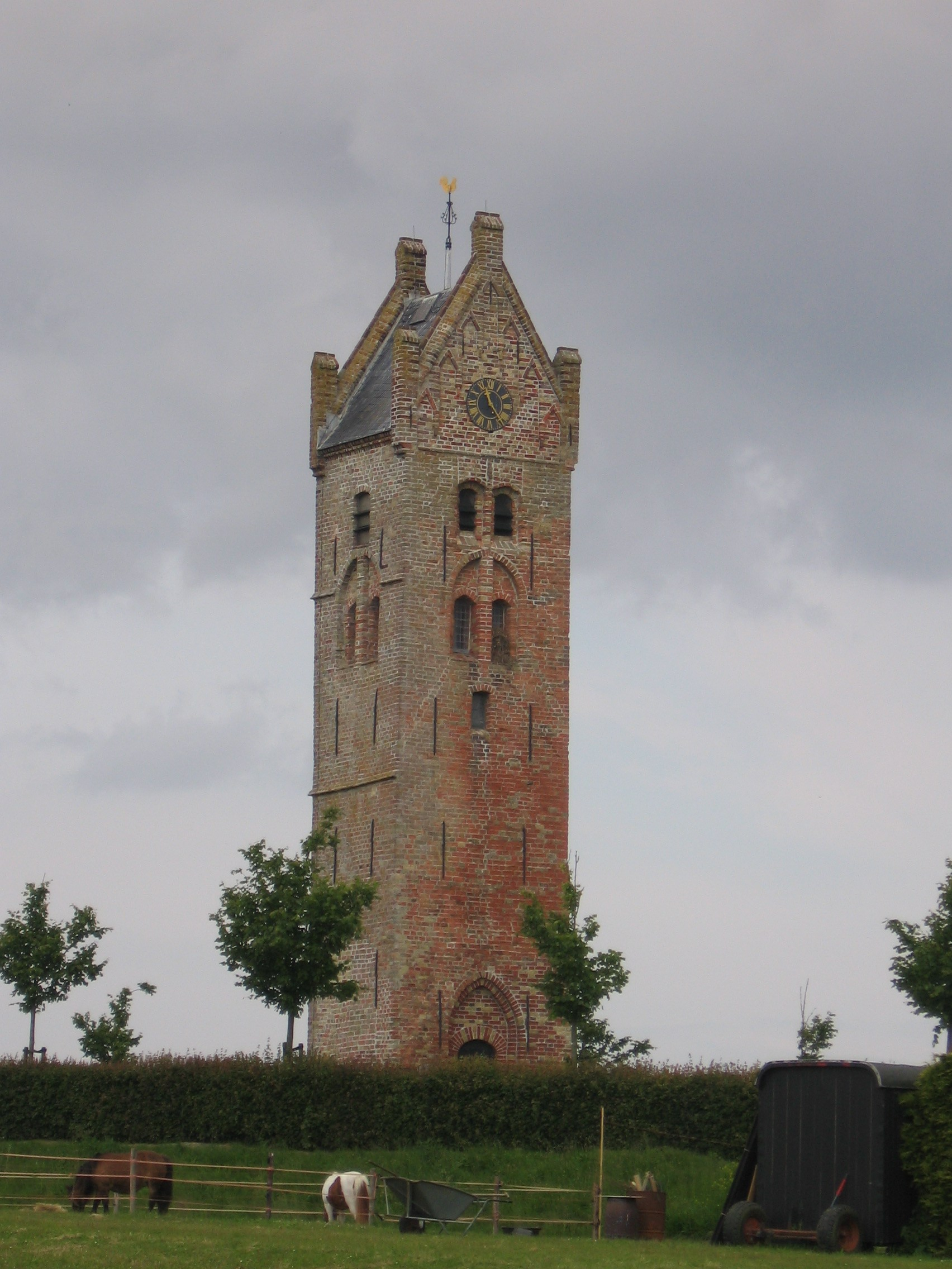 Church tower in Firdgum